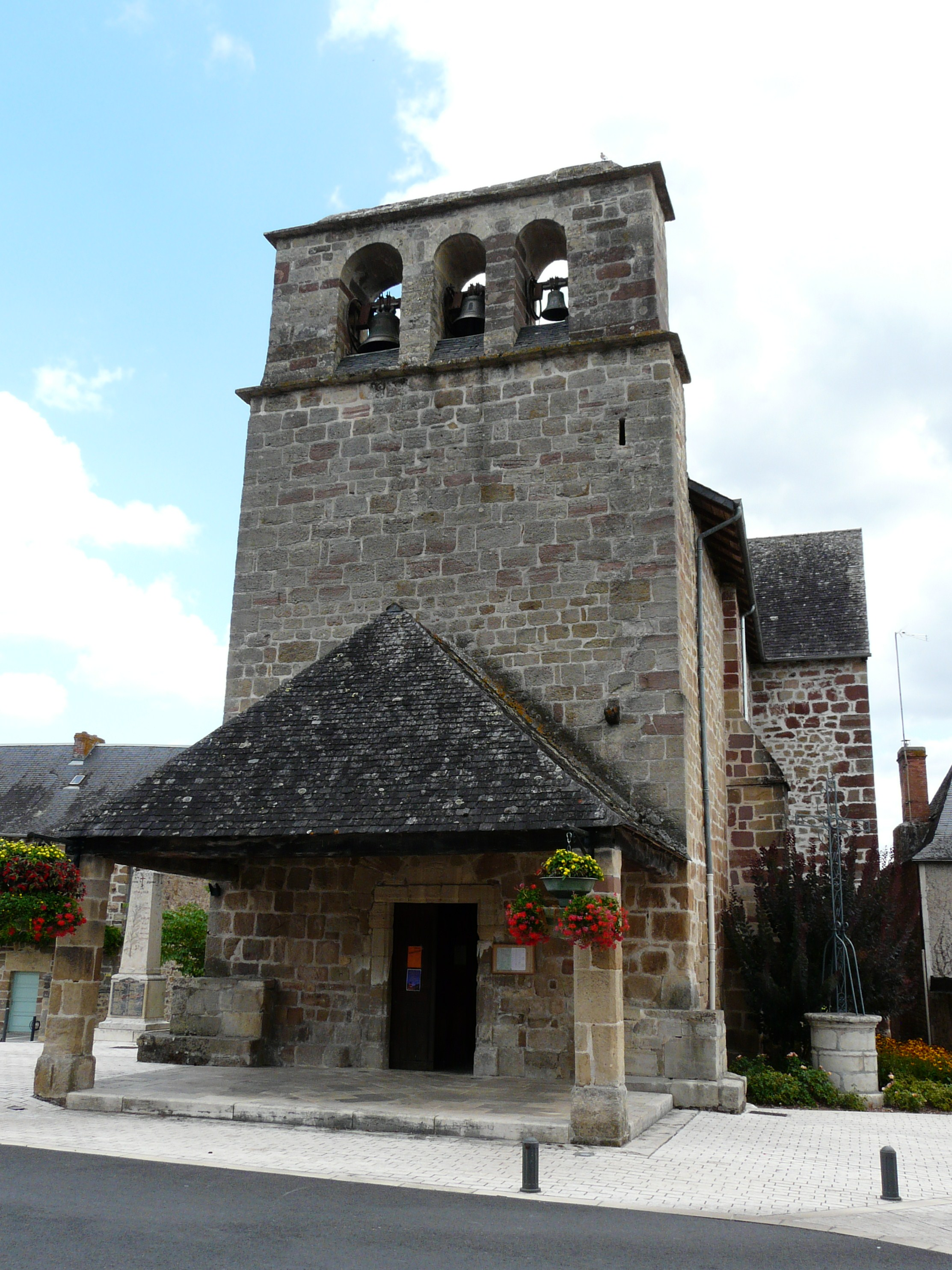 L'église Saint-Barthélemy de Cublac, Corrèze, France.